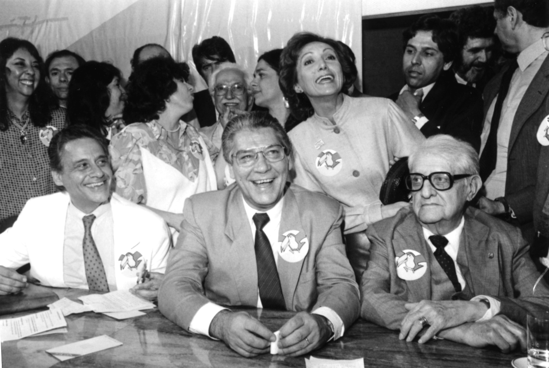 Criação do PSDB em 25/06/1988. Participantes - Fernando Henrique Cardoso, Mário Covas, Afonso Arinos. Foto: Célio Azevedo